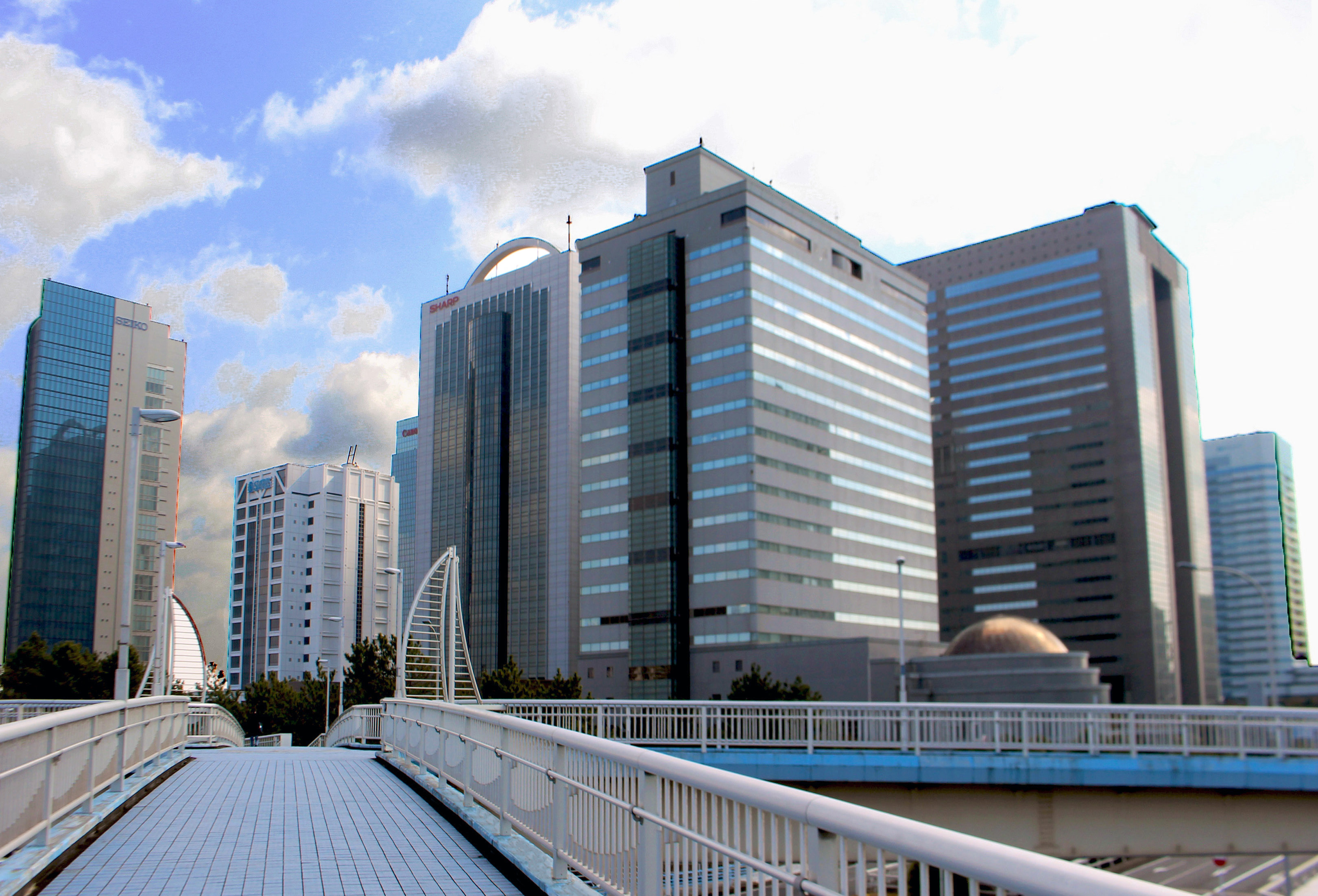 幕張新都心オフィス街